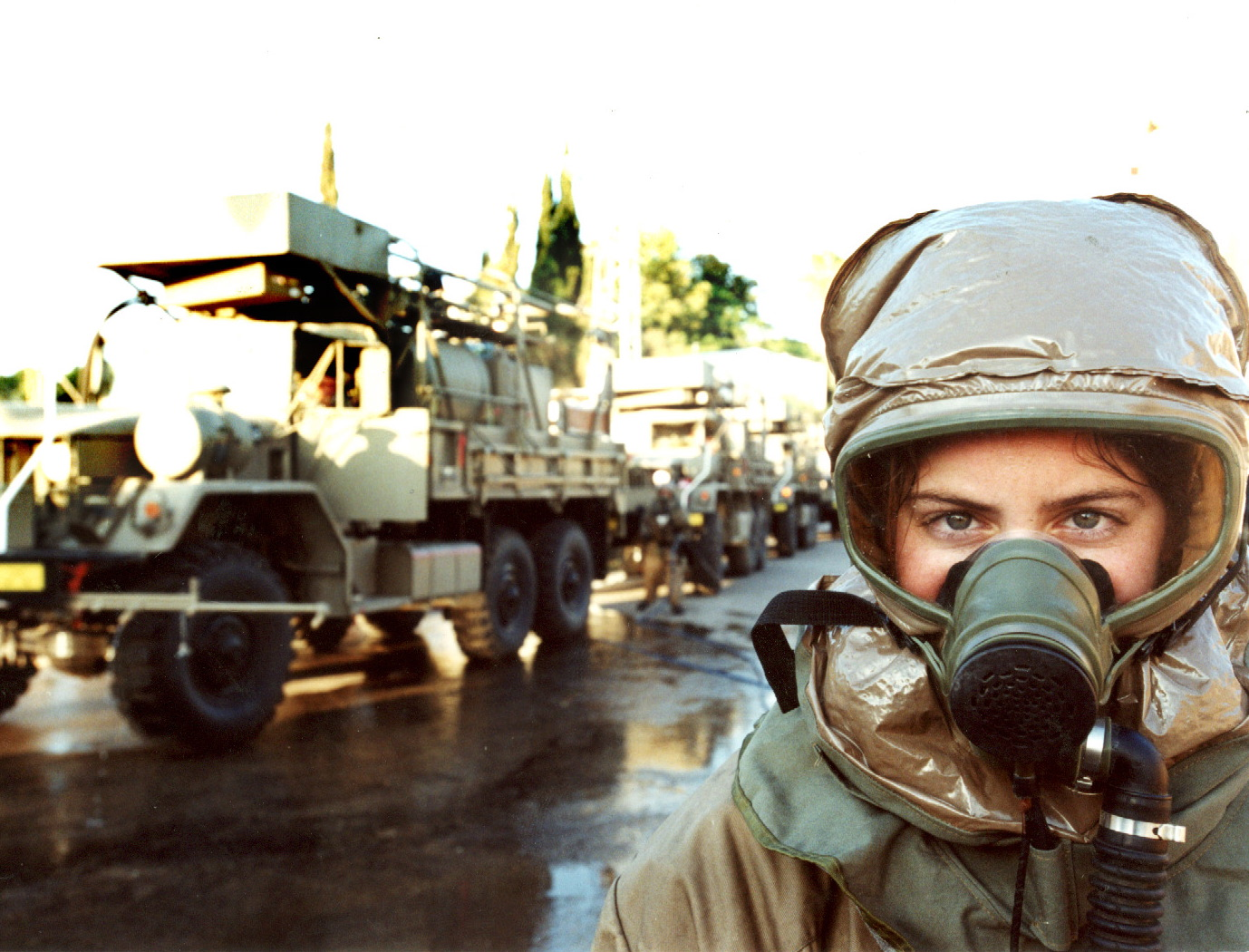 June 19, 2001. The Engineering Corps Atomic-Biological-Chemical Unit launches a new vehicle designed to purify areas after a chemical attack. יחידת אב"כ של חיל ההנדסה משיקה רכב חדש שנועד לטהר אזורים לאחר תקיפה כימית.